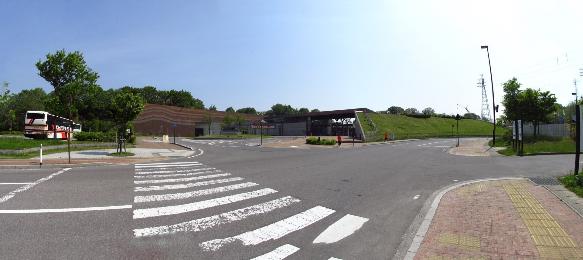 日本国、青森県、三内丸山遺跡、Sannai Maruyama ruins、縄文、Jomon、観光施設、Museum